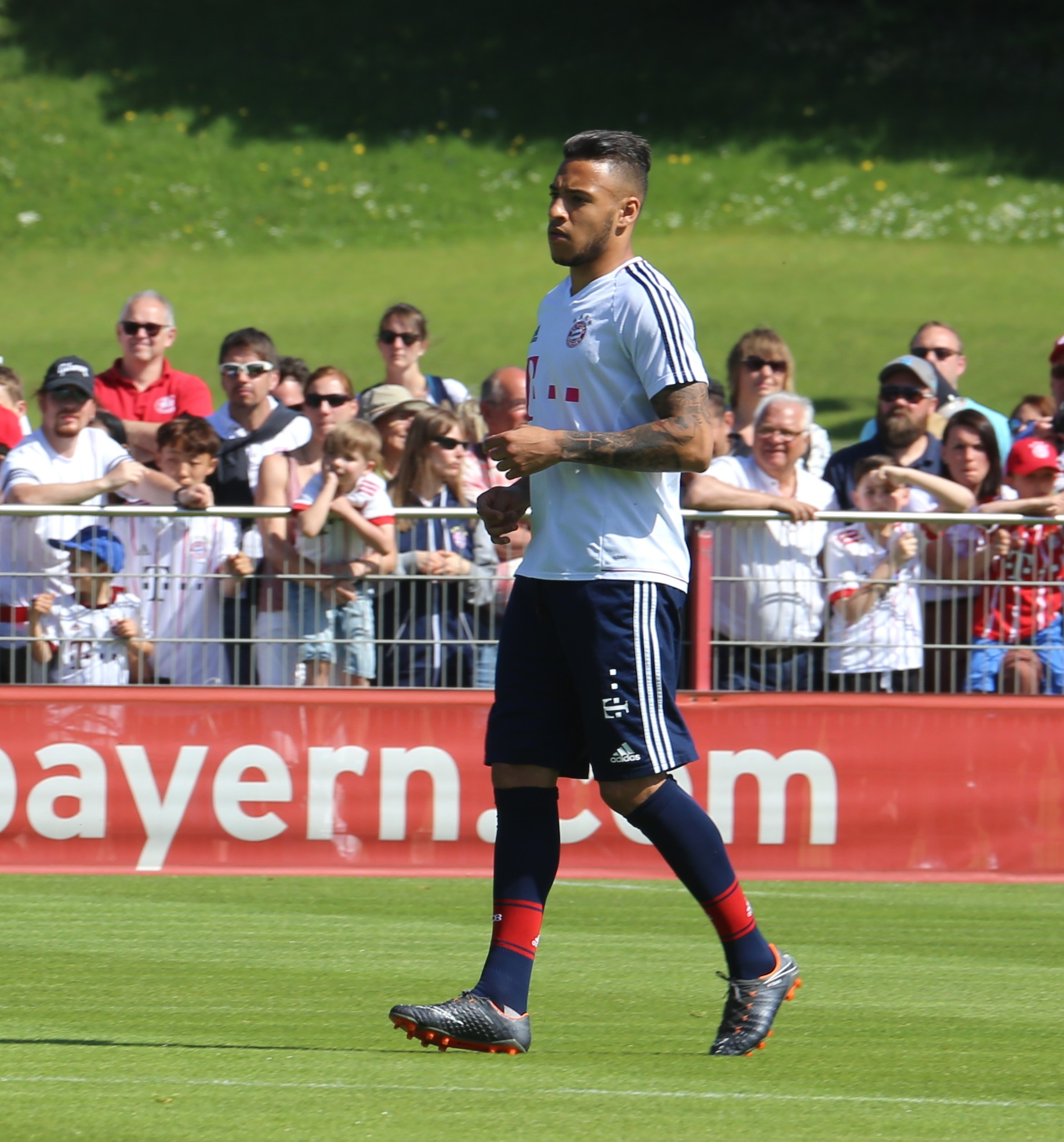 Corentin Tolisso, am 8. Mai 2018 beim Training auf dem Gelände des FC Bayern München